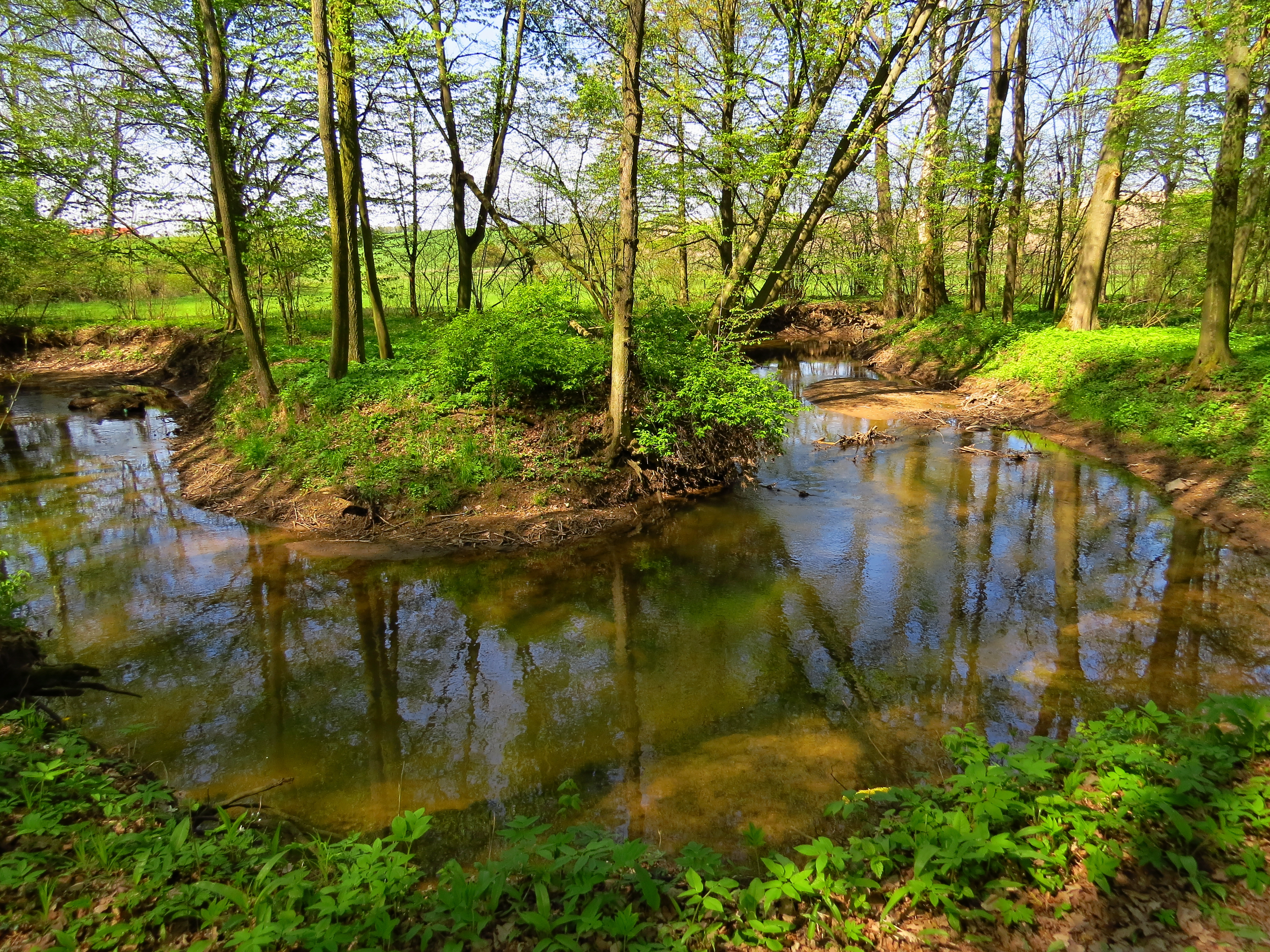 Meandry řeky Dědiny (Zlatého potoka)